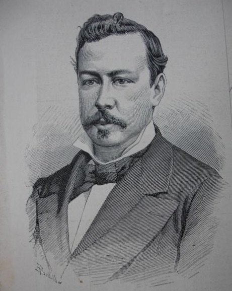 1883 La Asamblea Legislativa y el Senado de El Salvador aprueban una nueva Constitución, que permite que el Dr. Rafael Zaldívar continúe más años en el Poder Ejecutivo